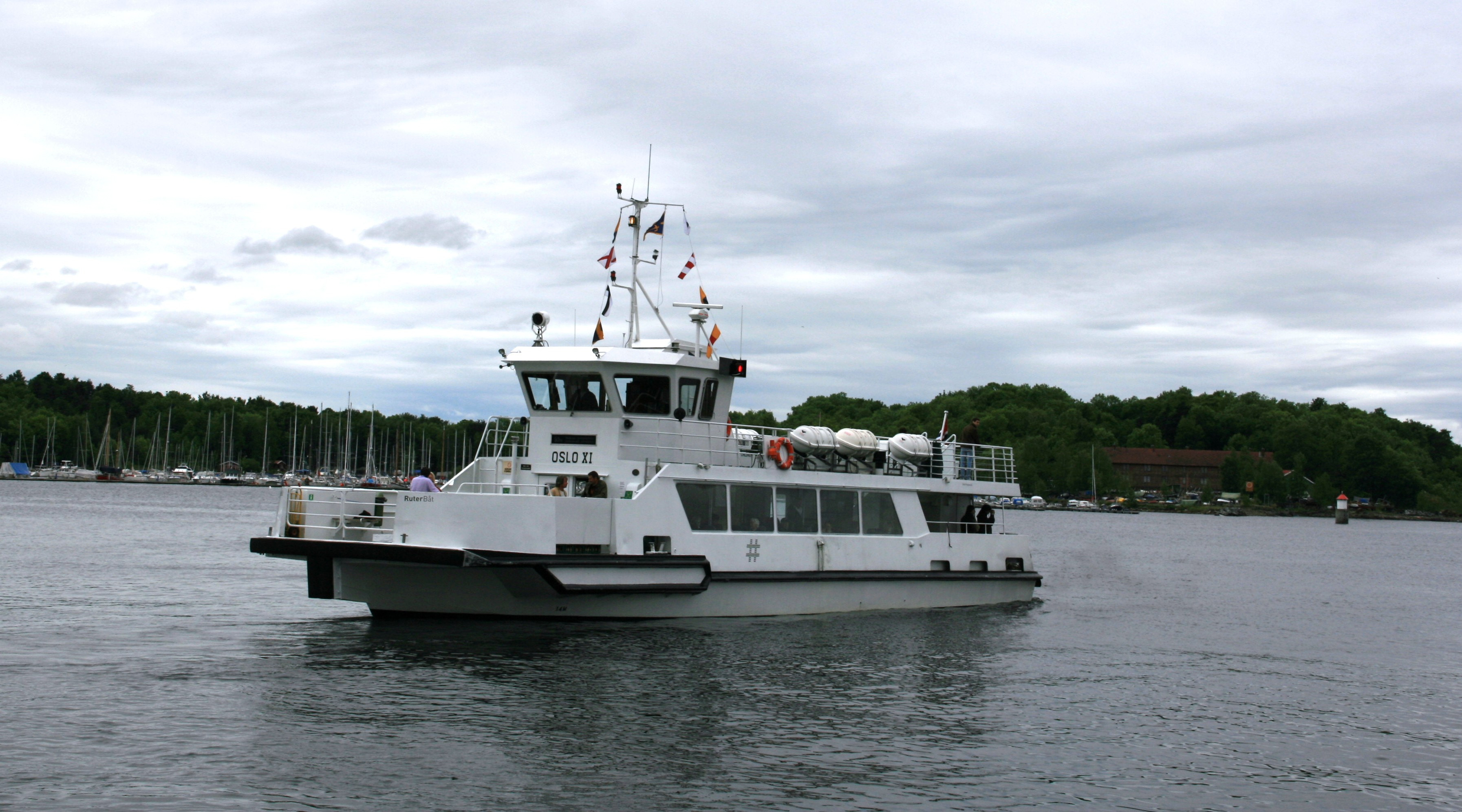 Ruter's passenger boat Oslo XI, from Vippetangen to Hovedøya